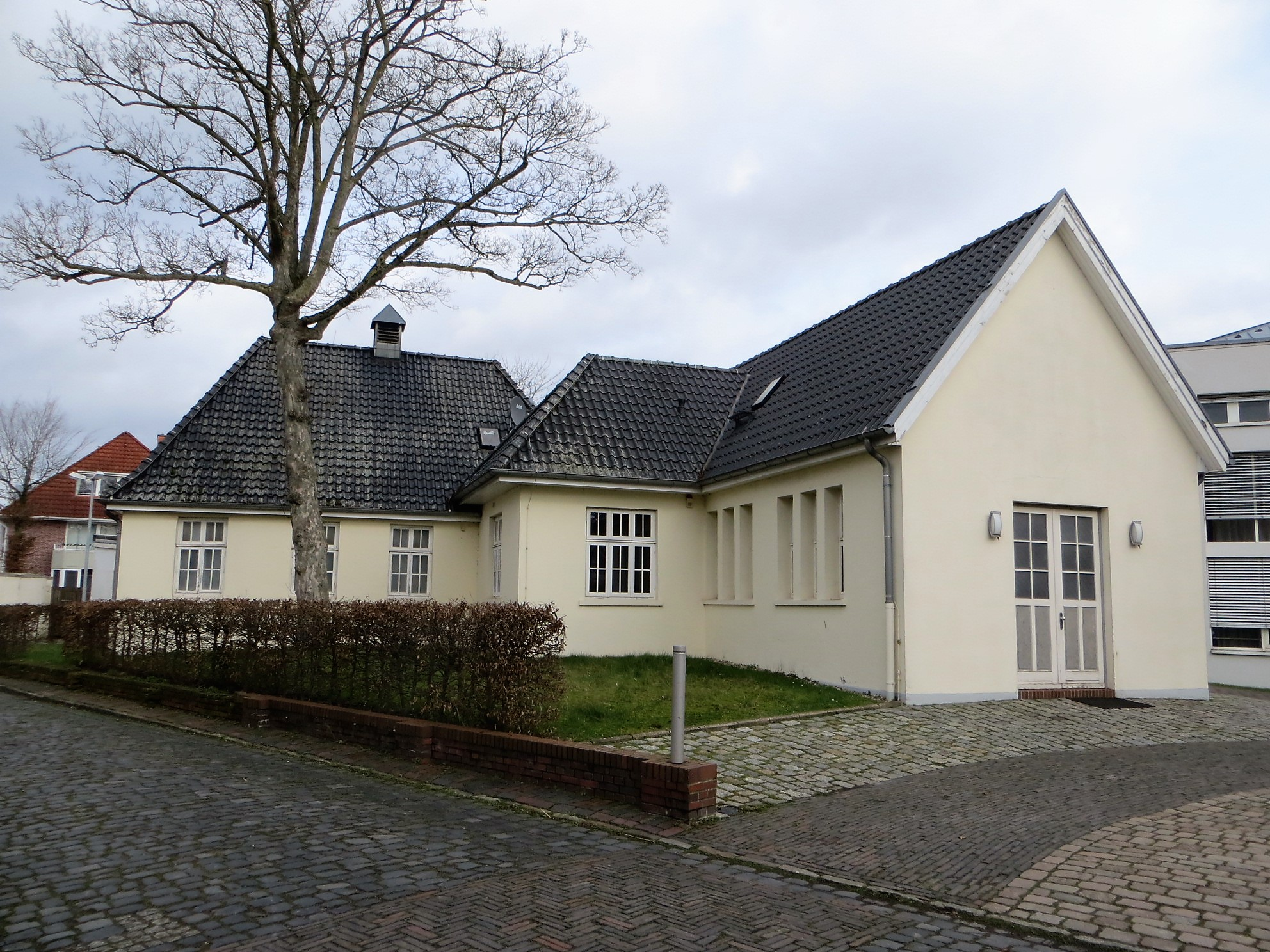 Gebäude auf dem Gelände eines ehemaligen Krankenhauses aus dem 19. Jahrhundert